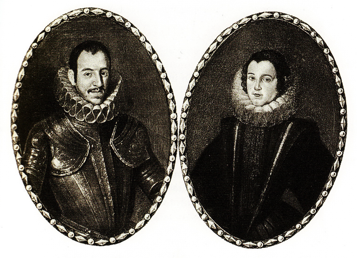 Gravat amb un retrat d'Enric III d'Aragó i Catalina Fernández de de Córdoba-Figueroa